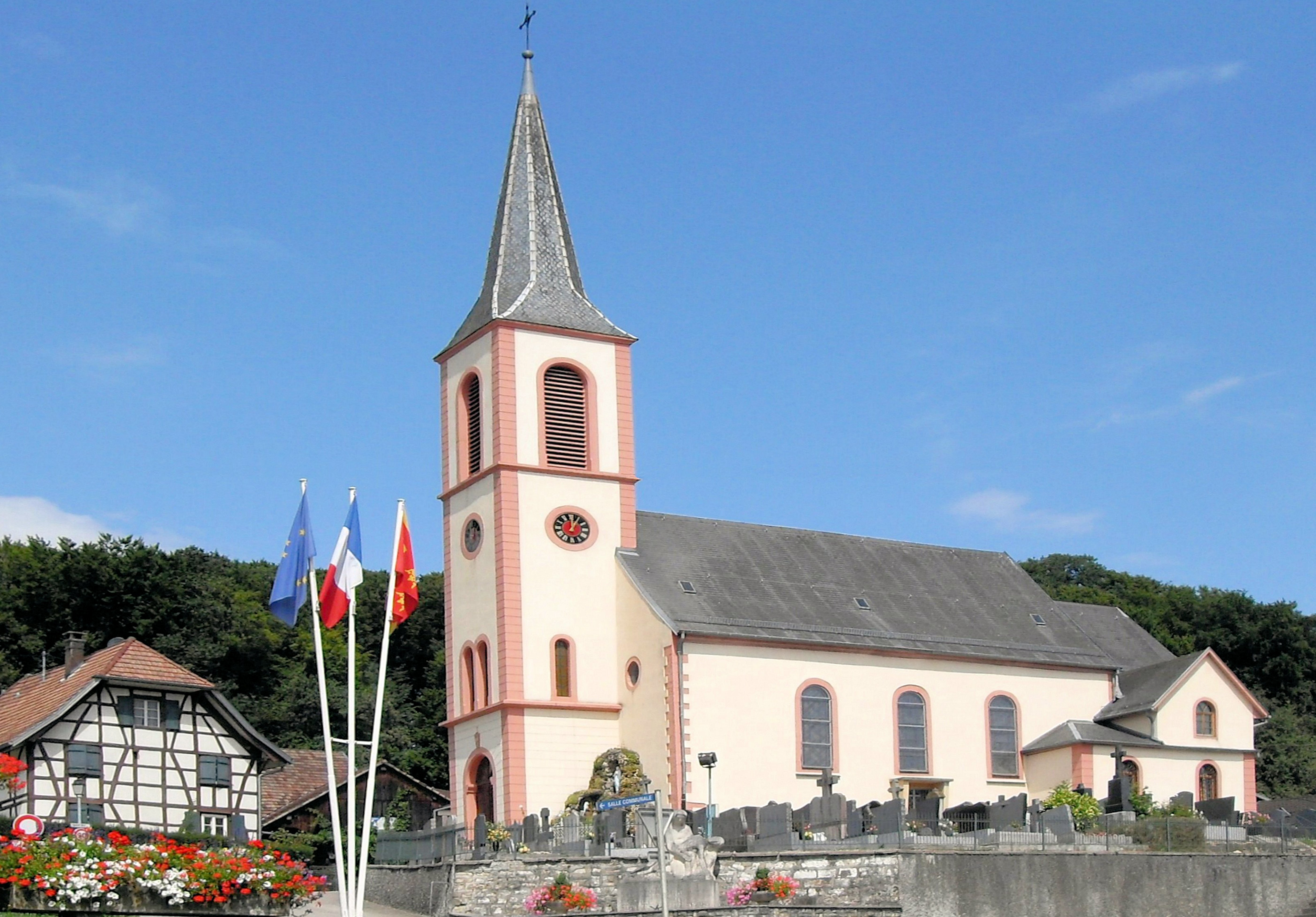 L'église Saint-Nicolas à Steinsoultz